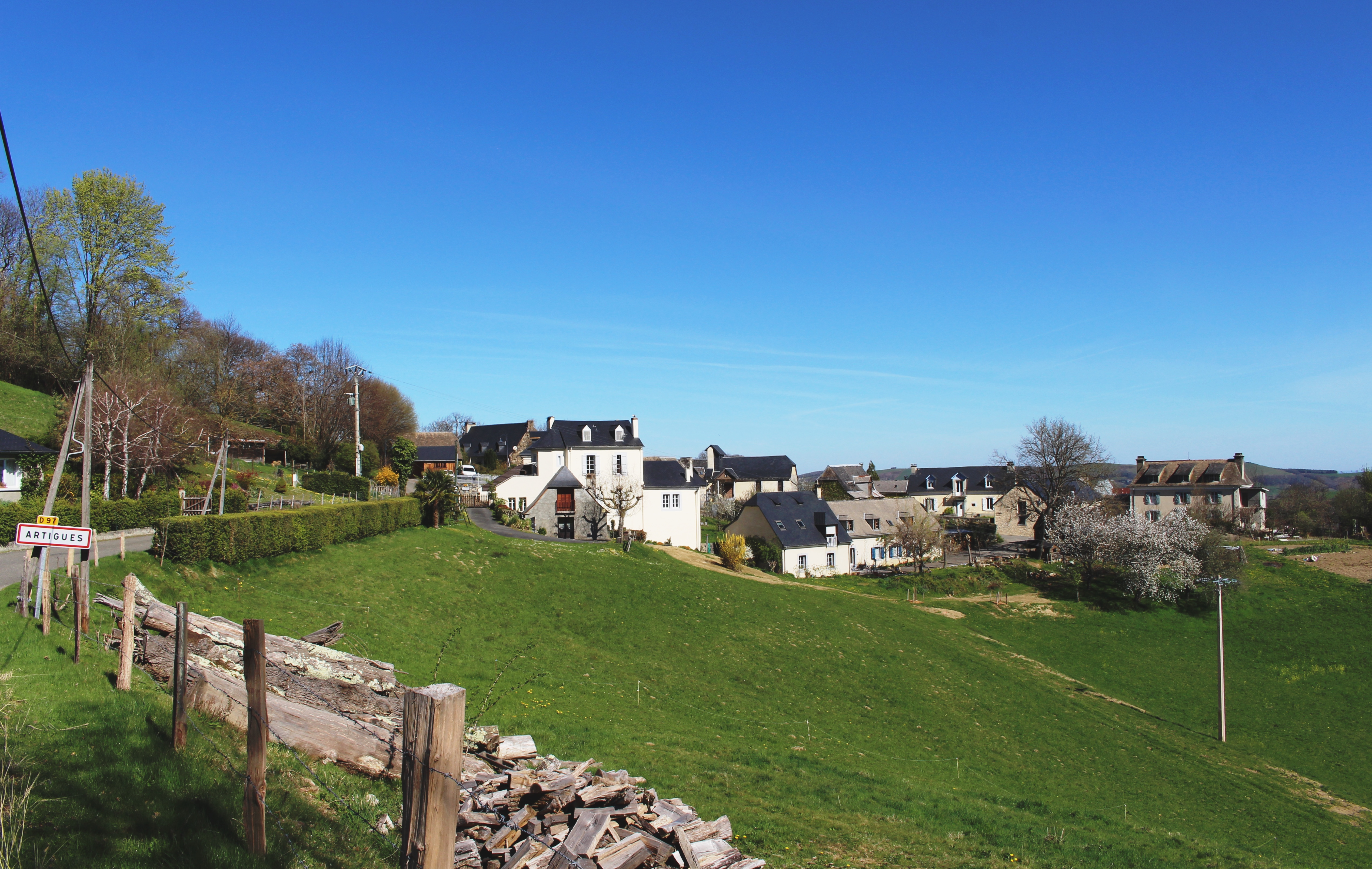 Artigues (Hautes-Pyrénées)